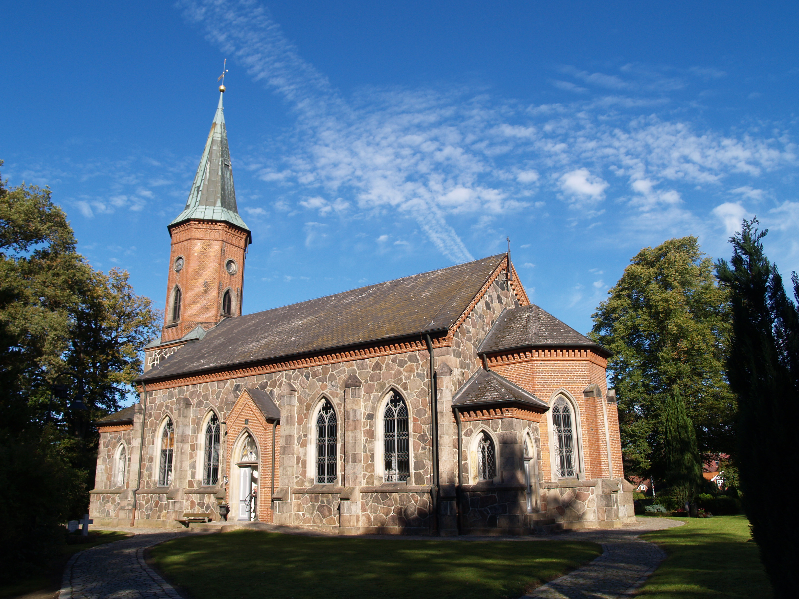 Kirche in Basthorst, Kreis Herzogtum Lauenburg, Deutschland